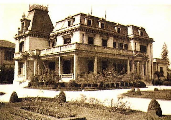 Casa das Rosas, projeto do escritório de Ramos de Azevedo, na Avenida Paulista, São Paulo, Brasil